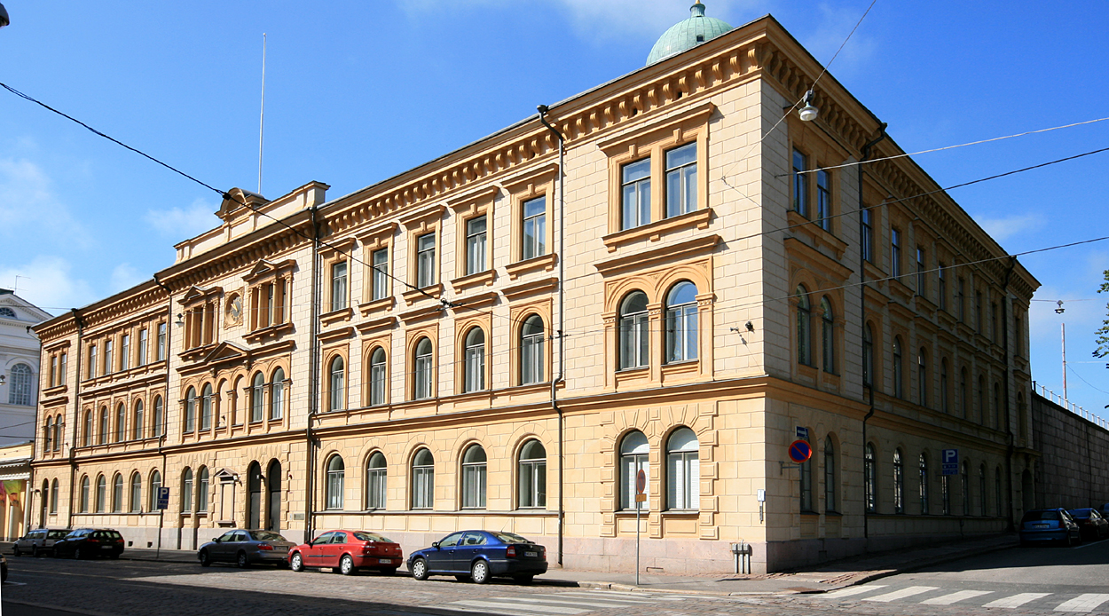 Rahoitustarkastus, Snellmaninkatu 6, Helsinki. Arkkitehti: Ernst B. Lohrmann. Rakennusvuosi: 1853.